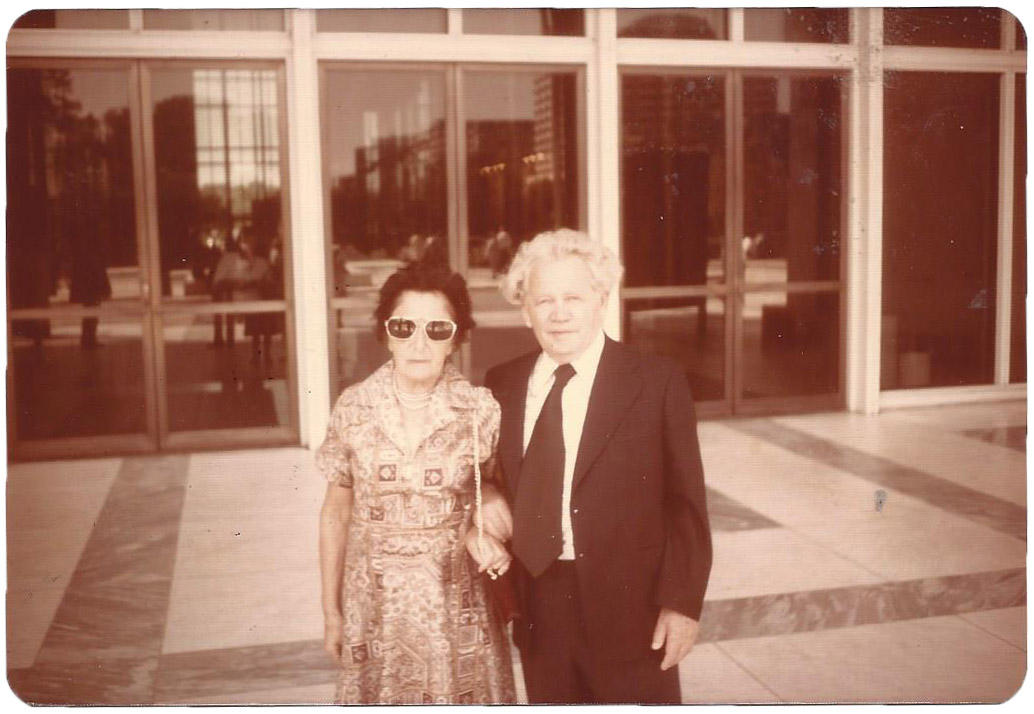 משה צחר ורעייתו אהובה לבית אייזנברג